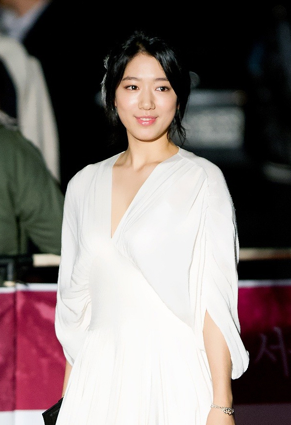 120119 서울가요대상-박신혜